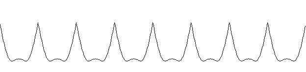 Rücktransformation vom Frequenzverlauf der gefilterten Signale zum zeitlichen Verlauf: Gefiltertes Nutzsignal